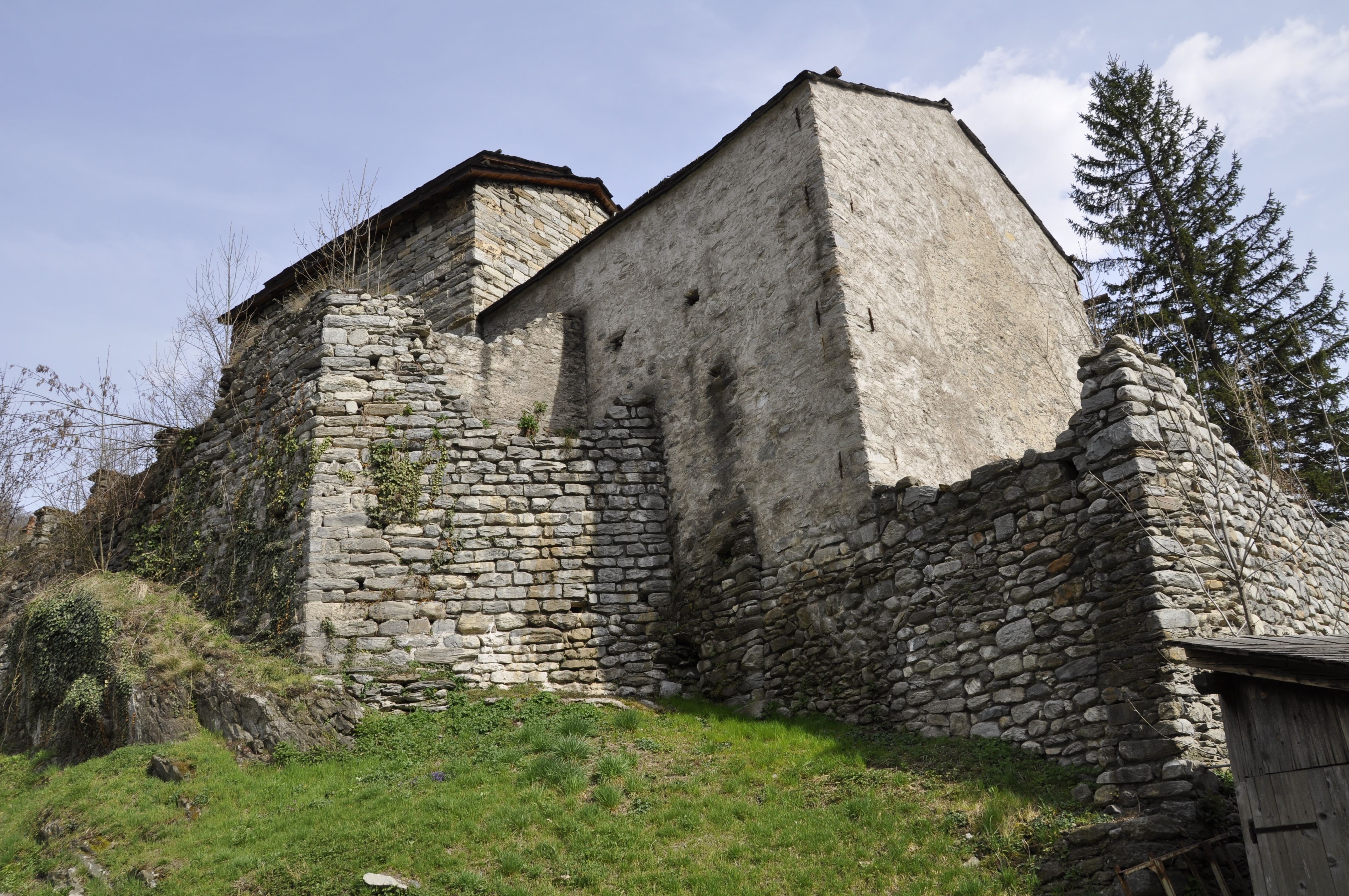 Schloss "Uf der Flüe"